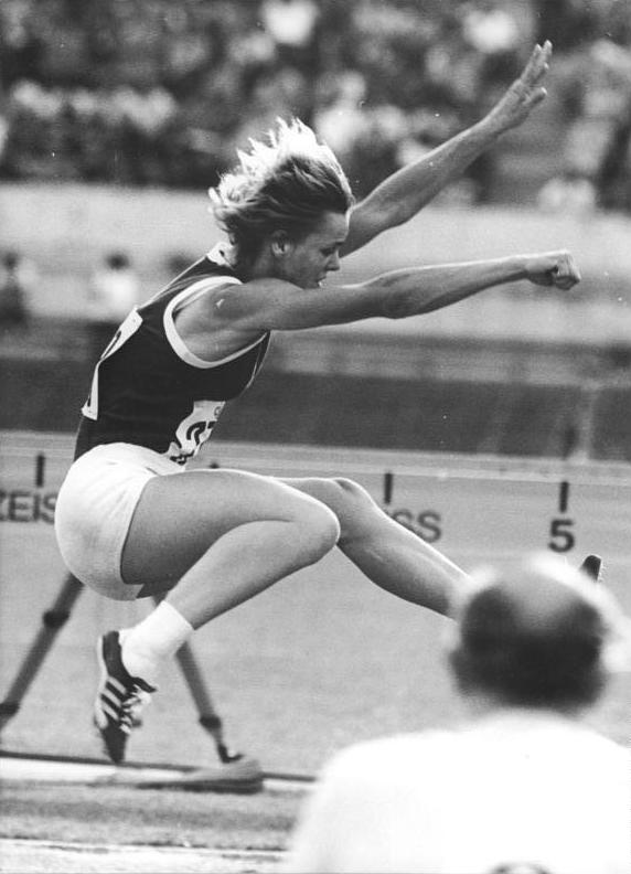 Angela Voigt ADN-ZB Demme 2.5.76 SFRJ: Leichtathletik-Dreiländerkampf in Split. Am ersten Tag des Leichtathletik-Dreiländerkampfes zwischen Großbritannien, Jugoslawien und der DDR (1.5.) zeigte Angela Voigt aus der DDR mit 6,61 m im Weitsprung eine gute Leistung (Foto von einem früheren Wettbewerb)